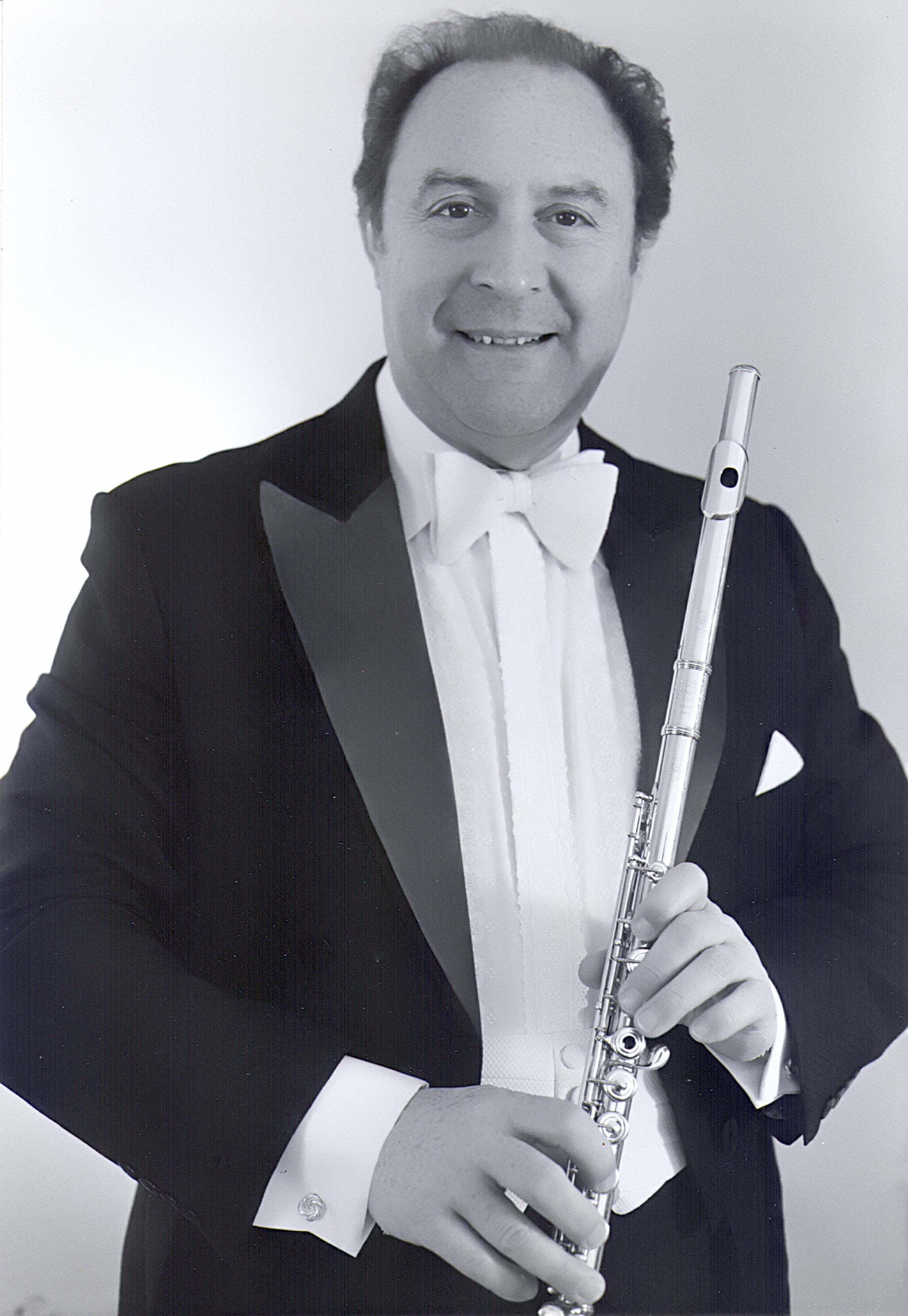 En su camerino antes de su recital de presentación ante la Sociedad Artística del Tecnológico de Monterrey